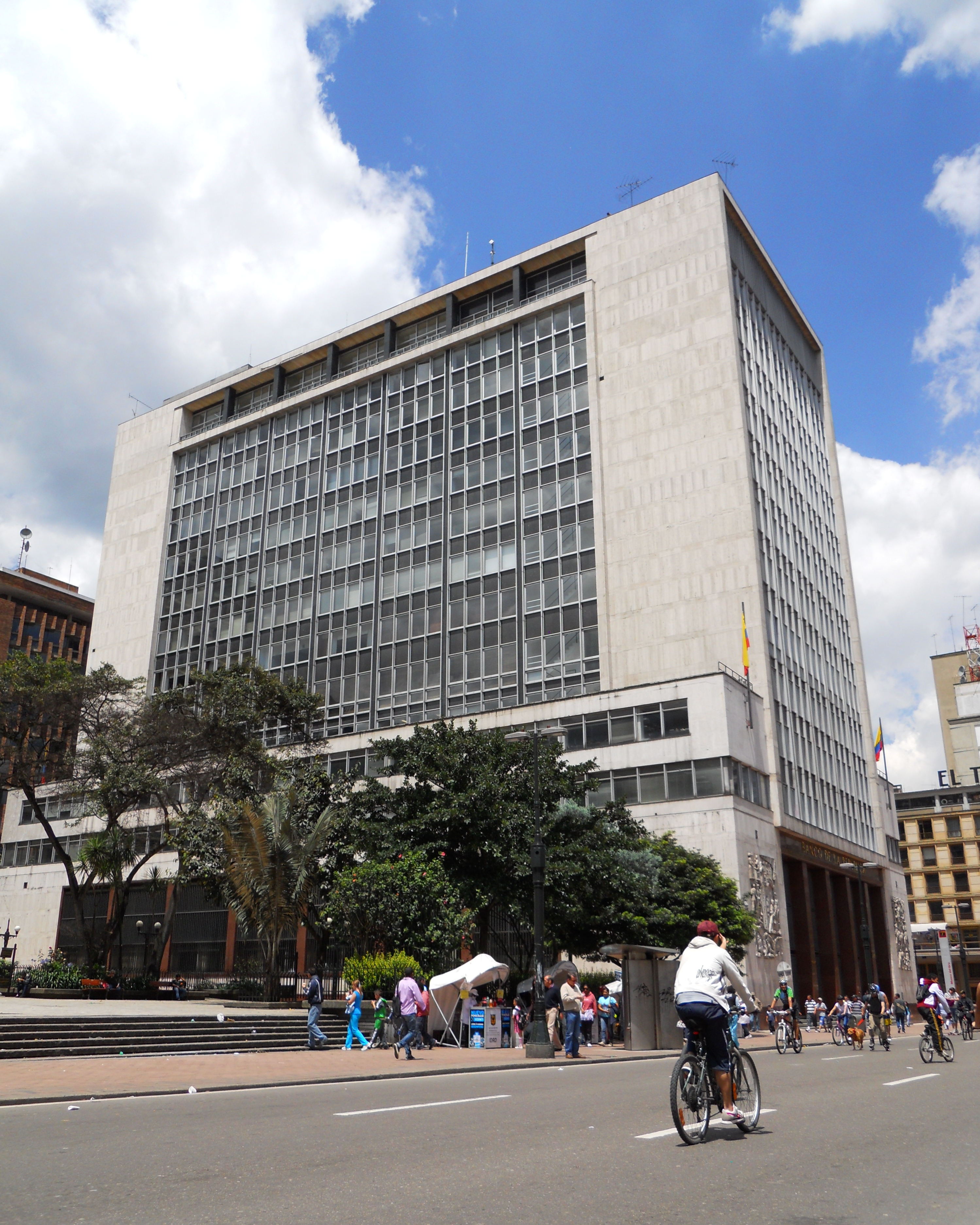 Ciclovía frente al edificio del Banco de la República. Bogotá, Eje Ambiental con kr 7.